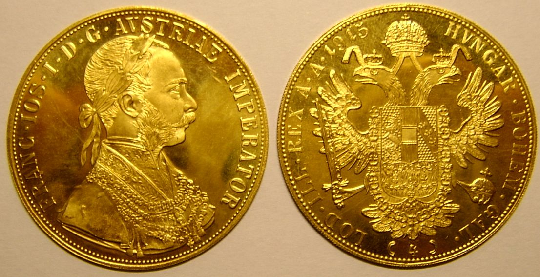 Österreichischer Vierfachdukaten